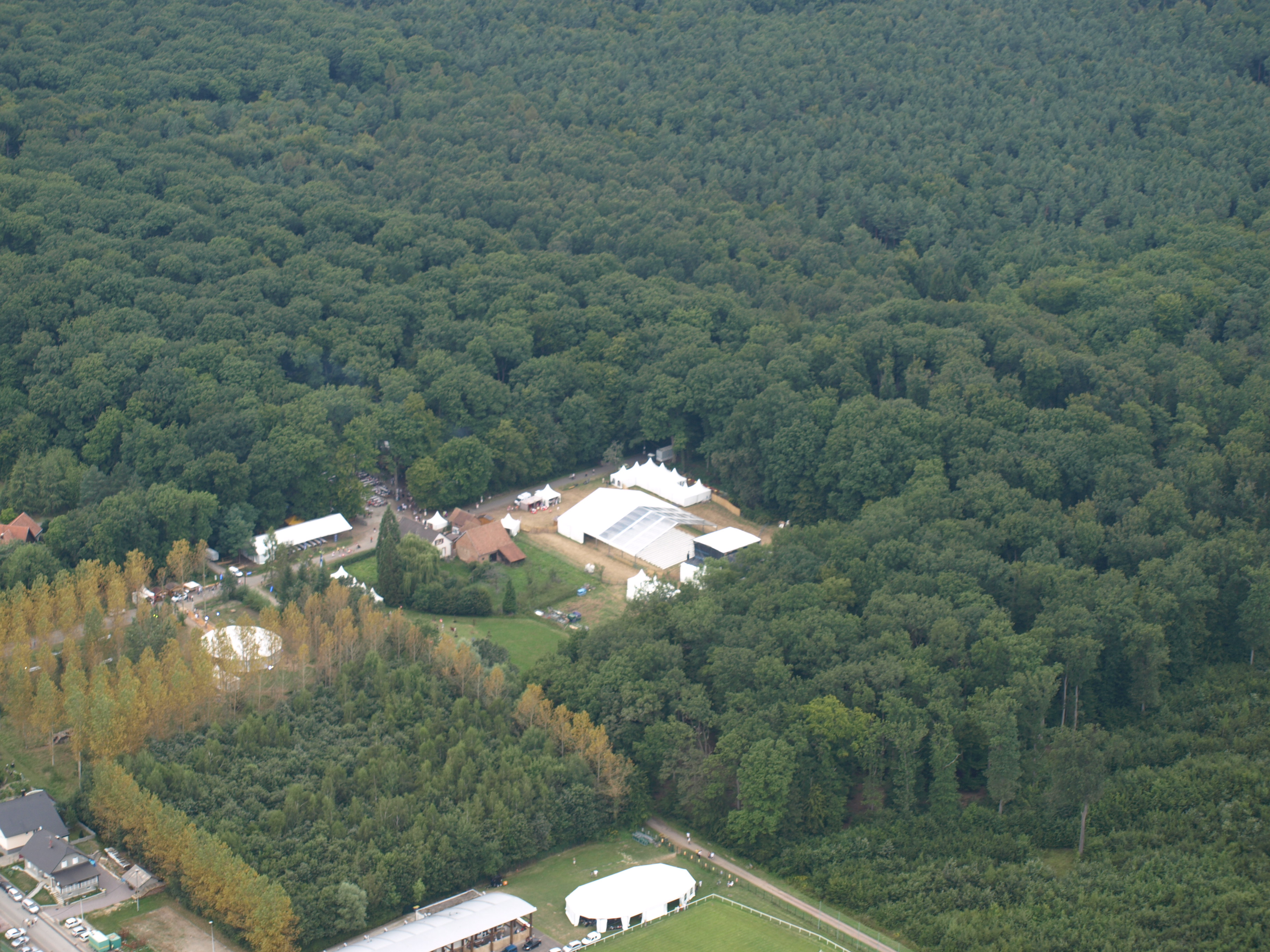 La forêt d'Ohlungen, où se tient tous les deux ans le festival Summerlied